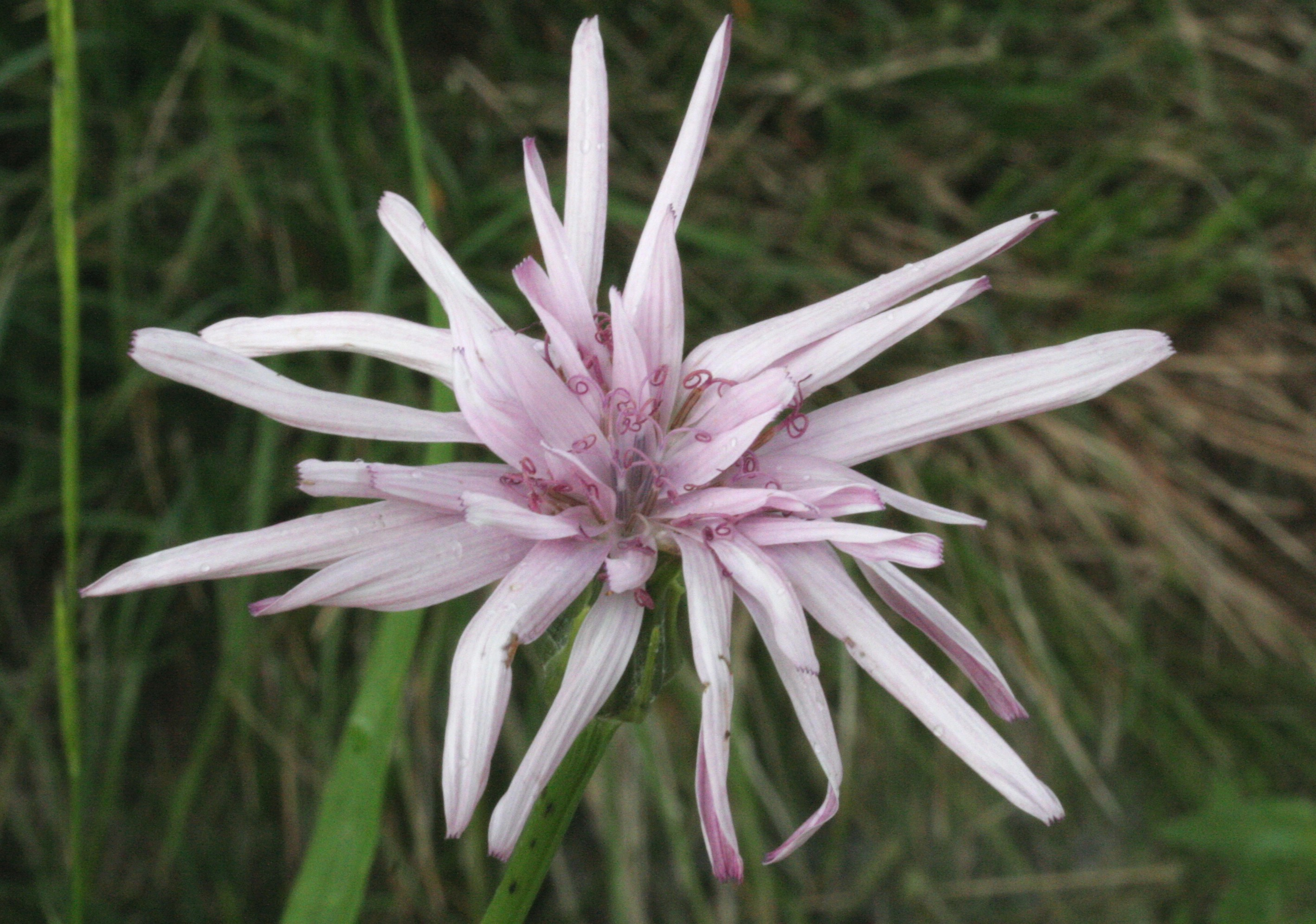 Podospermum roseum - Località: "Giardino Botanico delle Alpi Orientali", Monte Faverghera (BL), 1500 m s.l.m.